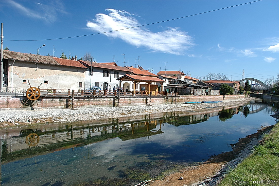 Naviglio a Bernate Ticino